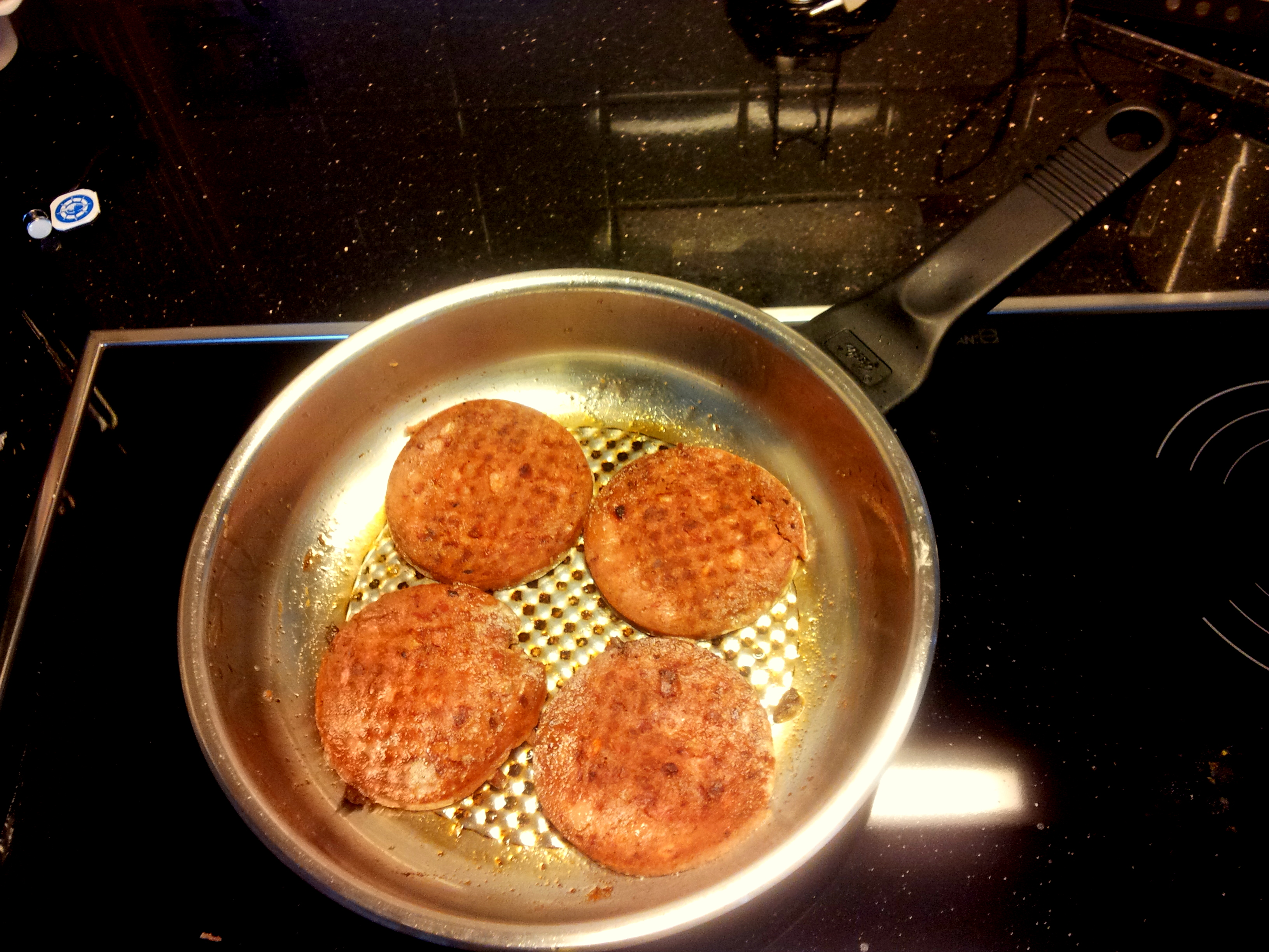 Nedersaksies: 4 Pläkskes Tweantsen bakworst in de panne.